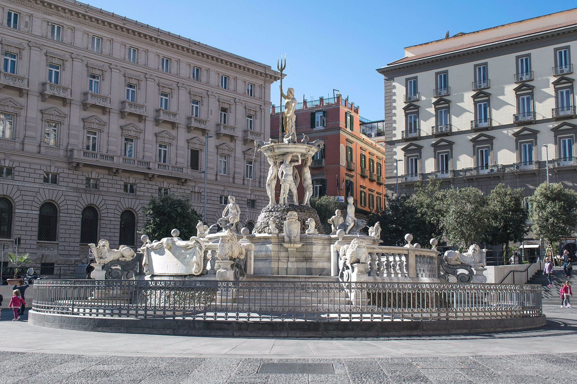 Fantana del Nettuno (Napoli)